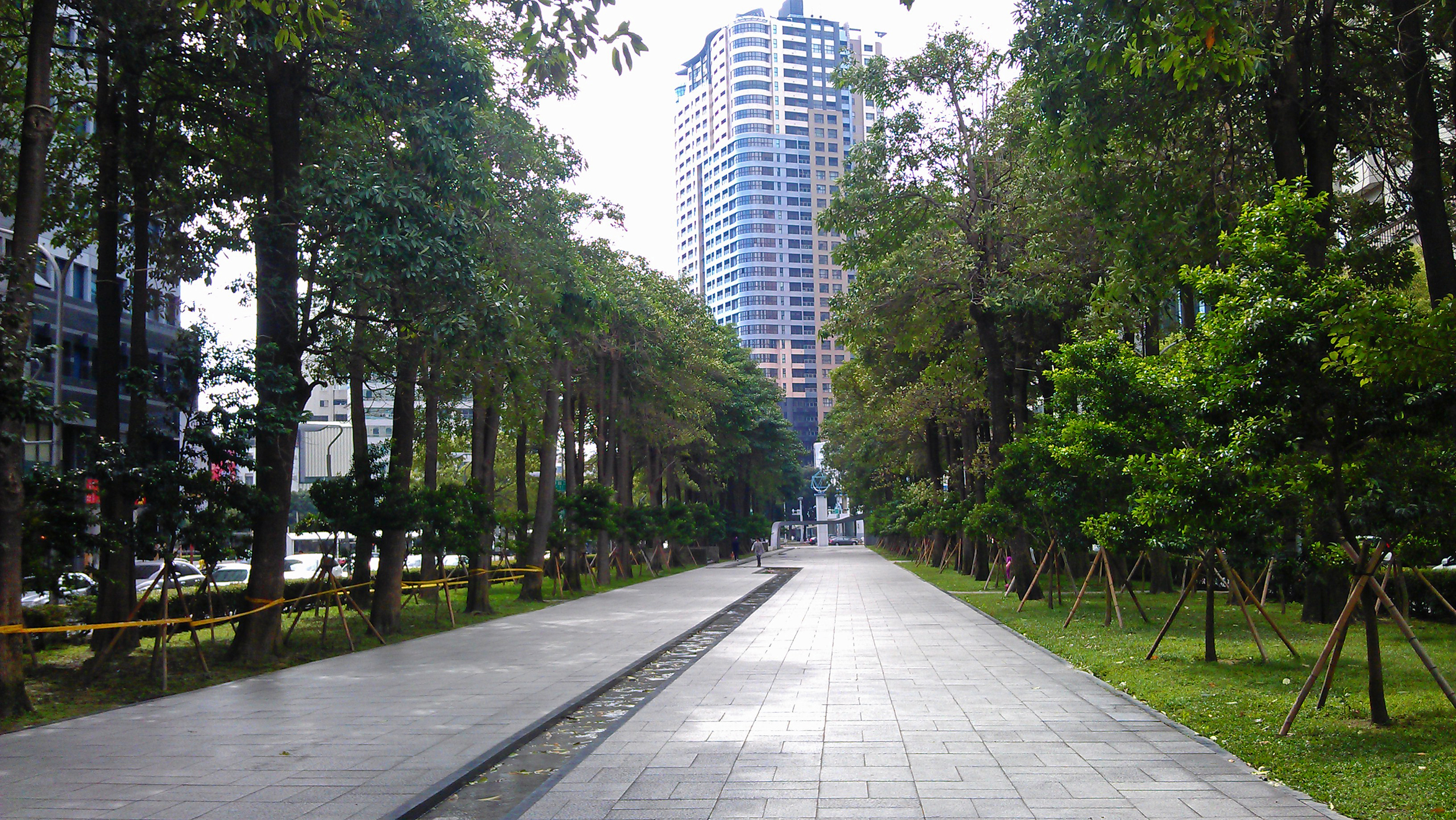 經國園道 科博館段